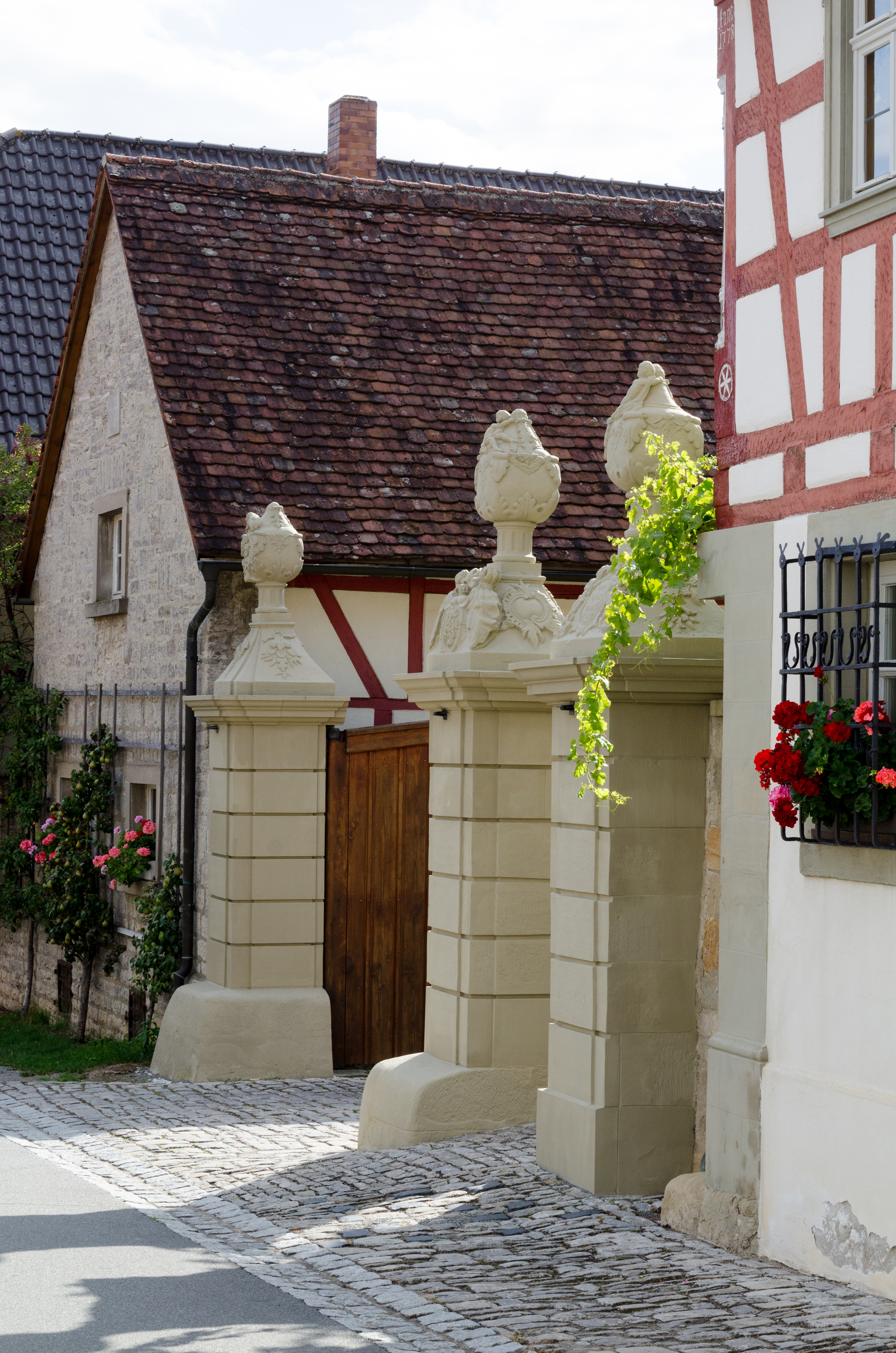 Willanzheim, Hüttenheim 58